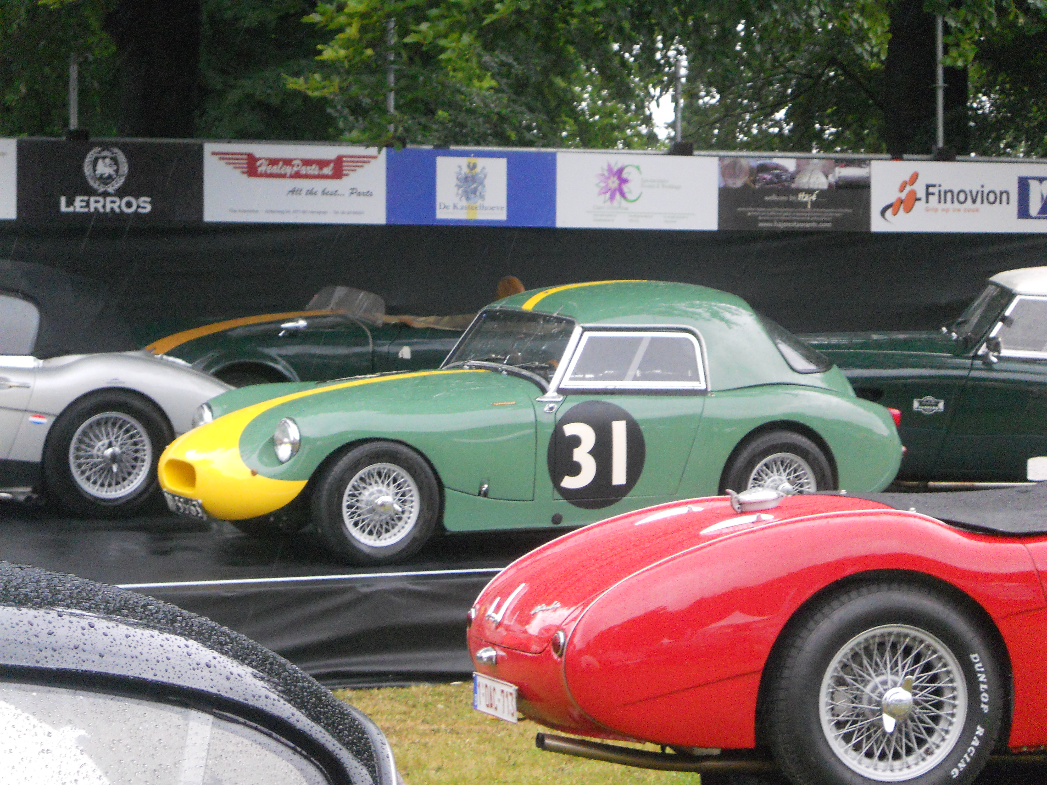 Concours d'Elegance 2012